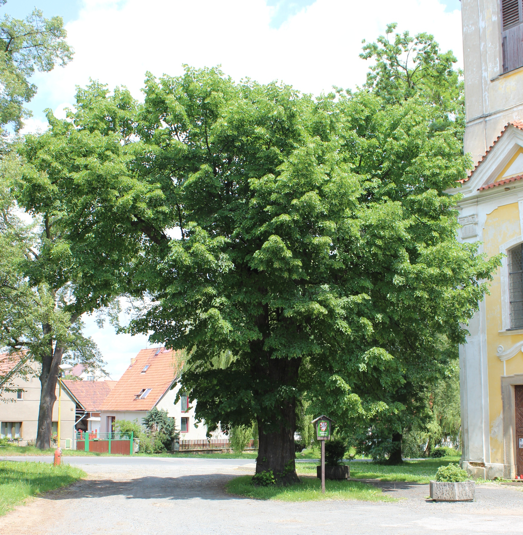 Památný strom (Bratronická lípa) v Bratronicích v kladenském okrese (pohled od jihu).